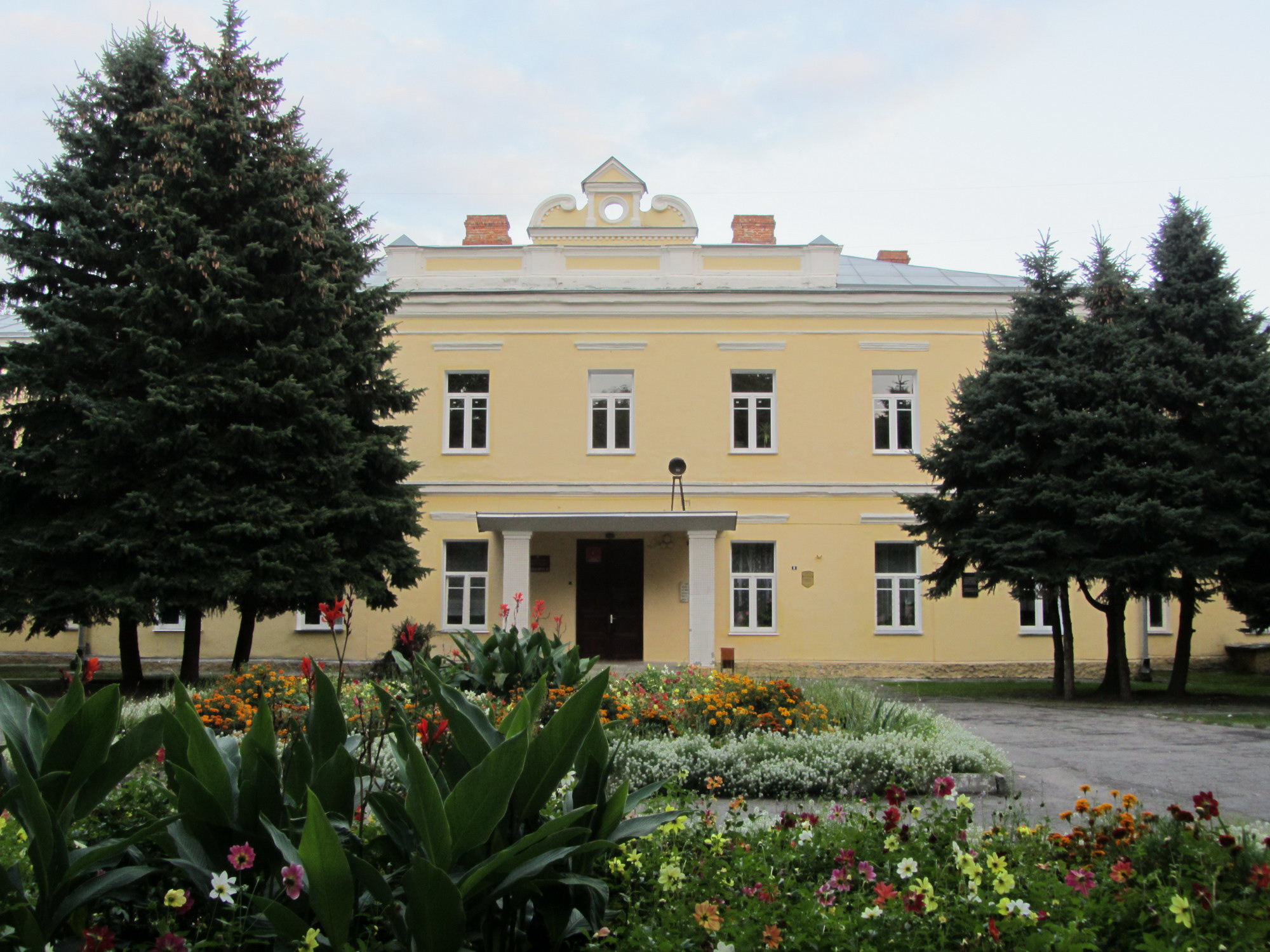 Беларуская (тарашкевіца): Будынак былой духоўнай вучэльні. г. Гомель This is a photo of Belarusian heritage monument. Reference number: 313Г000010 ( WLM)